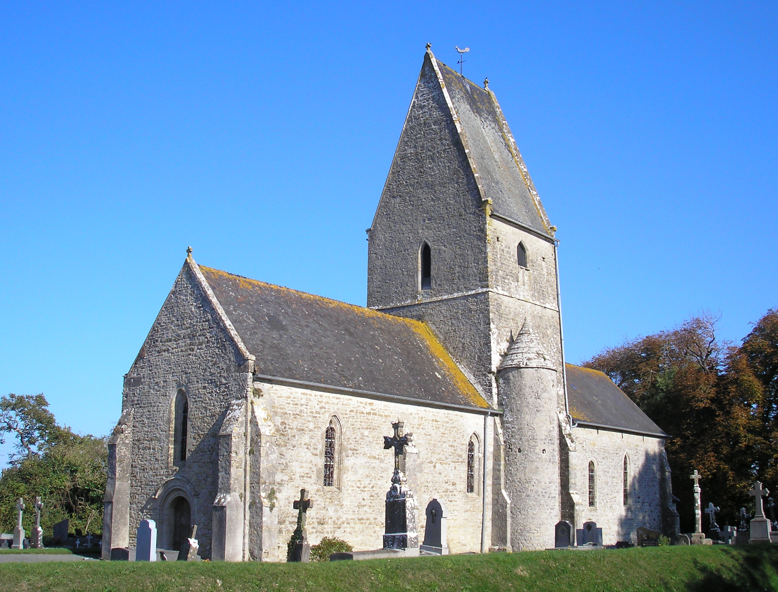 Vierville (Normandie, France). L'église Saint-Éloi.